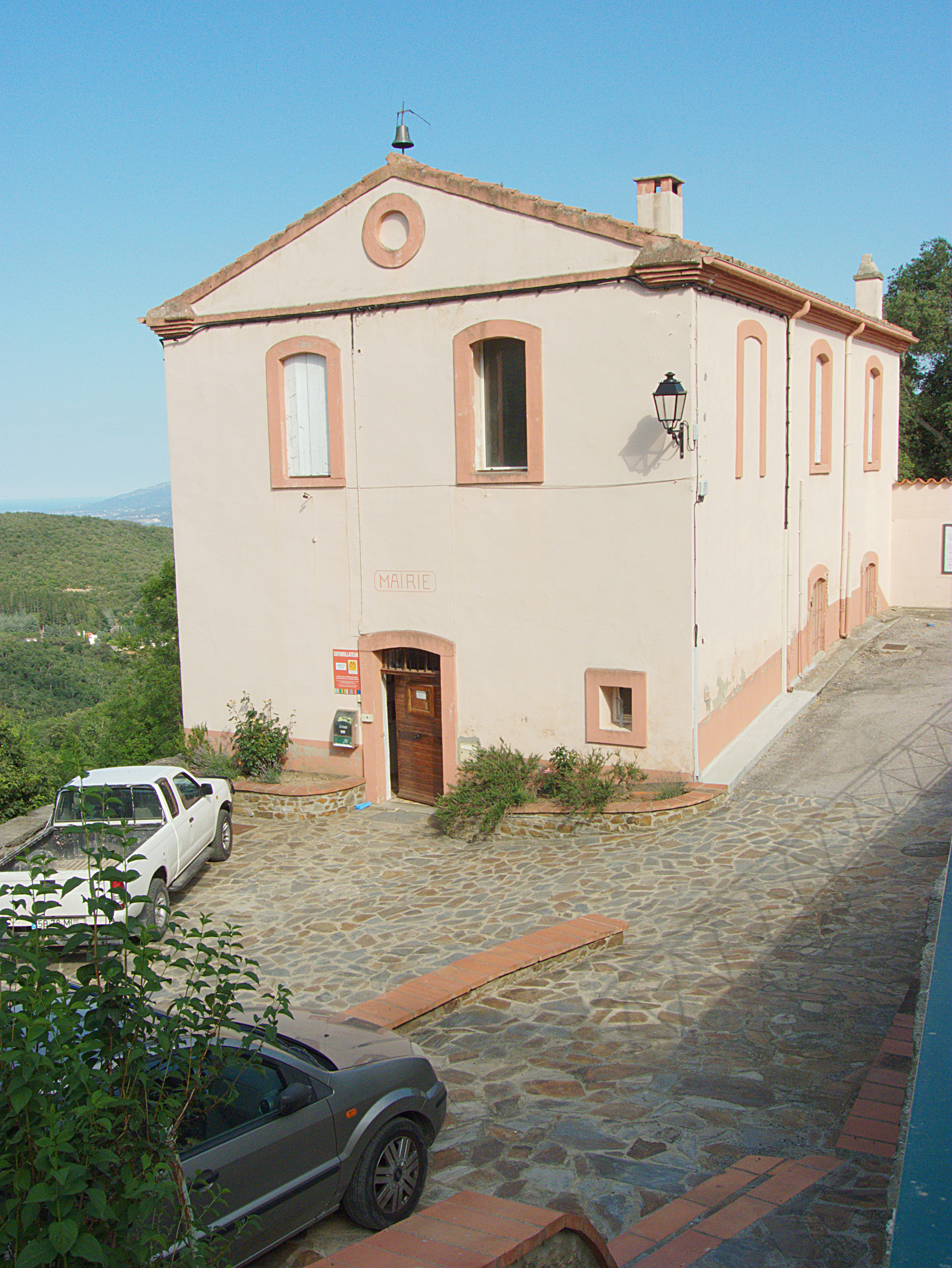 Mairie, Taillet (Pyrénées-Orientales, Languedoc-Roussillon, France)